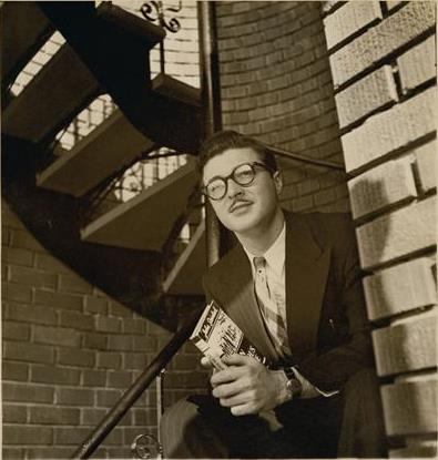 Roger Lemelin (1919-1992)